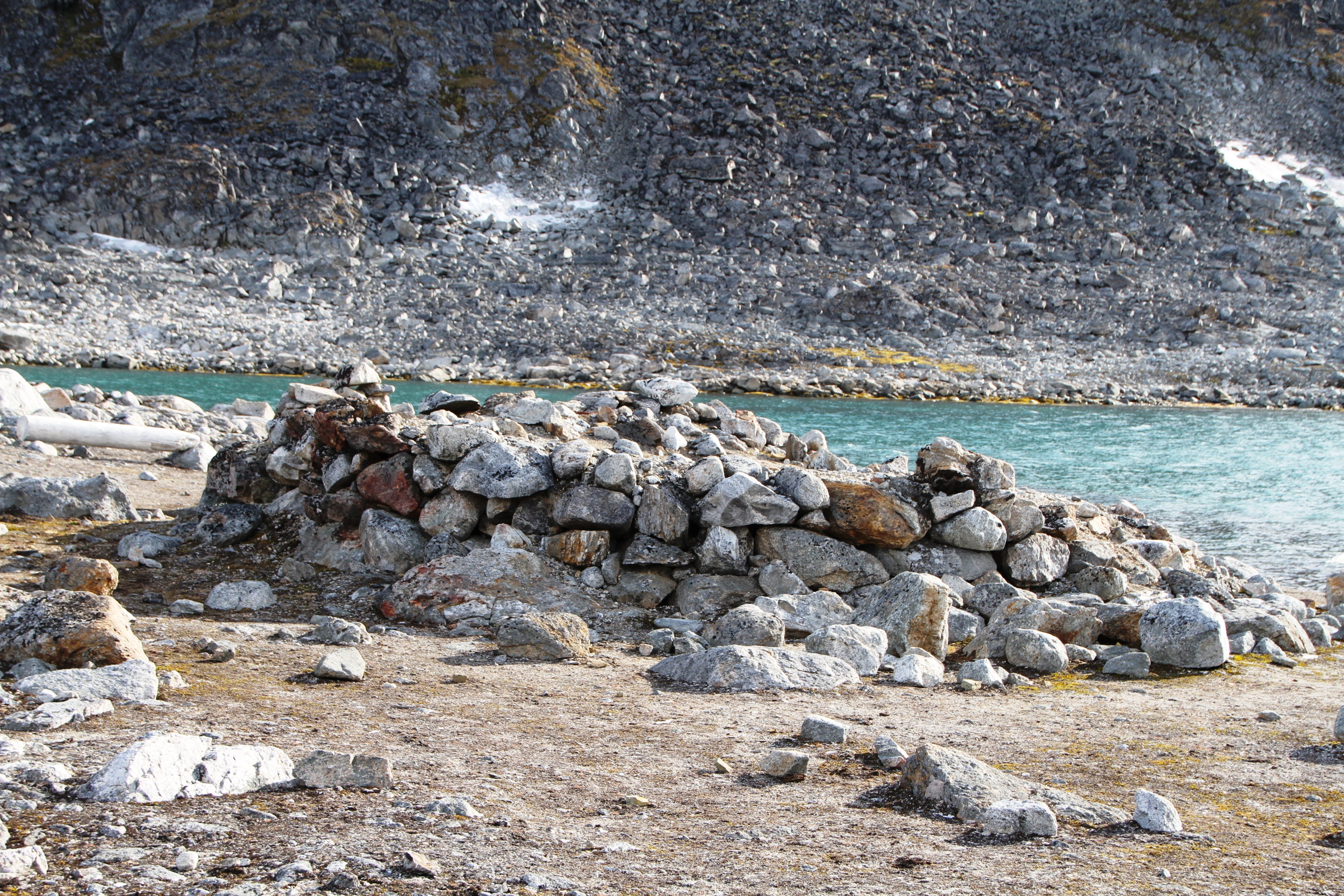 Dutch whaling smeeren-ovens with combined whalehunters' graves, Sallyhamna, Albert I Land, northwestern Svalbard.